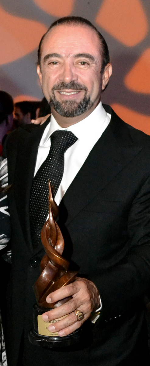 Foto de Eugenio Baeza Fares